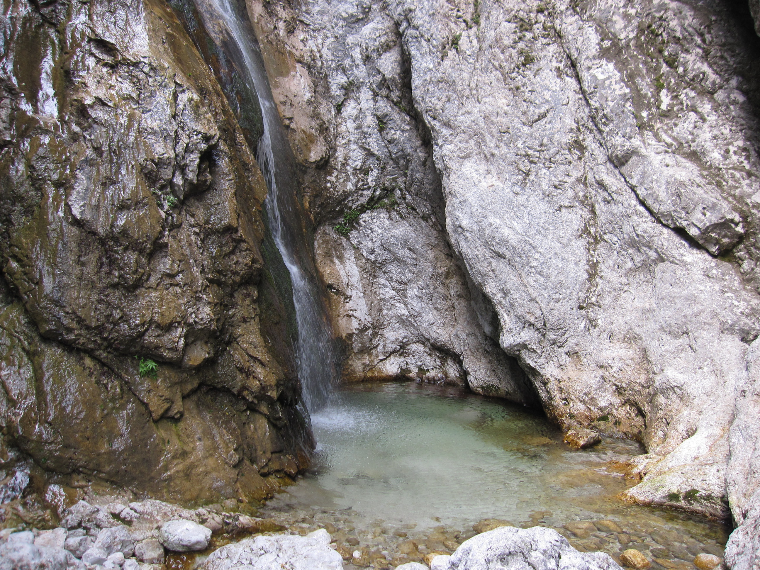 Tolmun o vznožju slapu Orglice (težje dostopen)